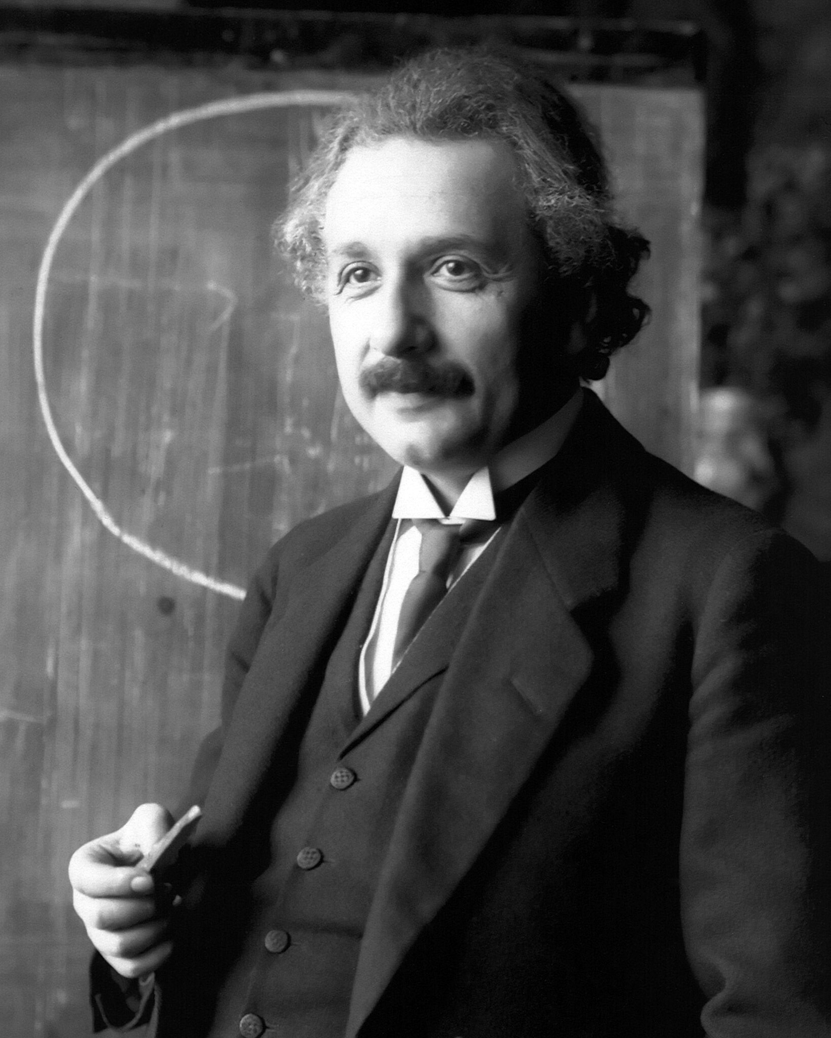 Albert Einstein during a lecture in Vienna in 1921